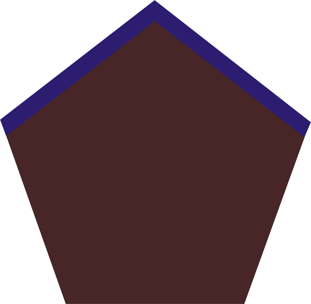 Patka służby zdrowia (na kołnierz) wprowadzona w Wojsku Polskim w Anglii w 1941